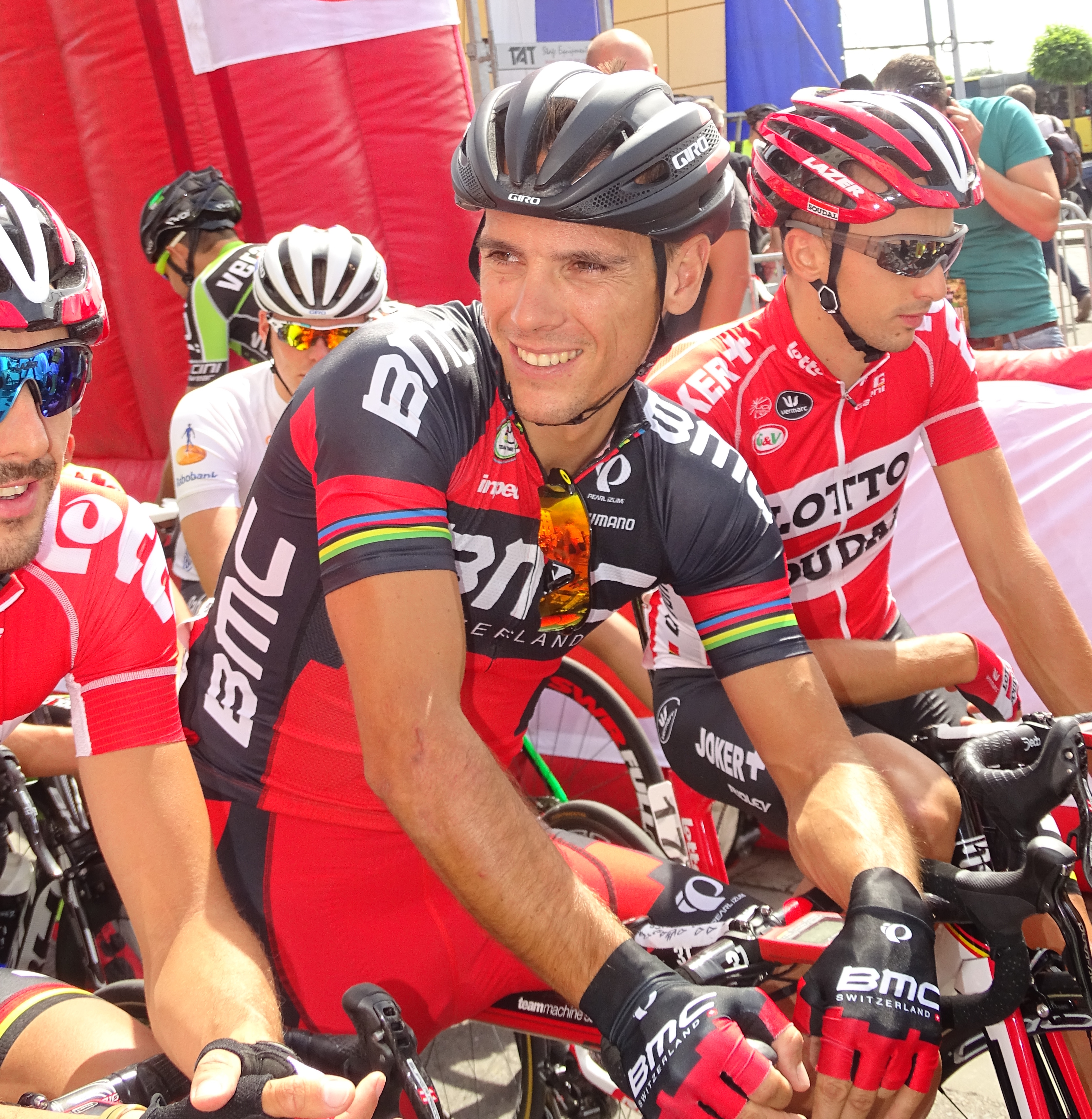 Reportage réalisé le mercredi 22 juillet à l'occasion du départ du Grand Prix Pino Cerami 2015 à Saint-Ghislain, Belgique.